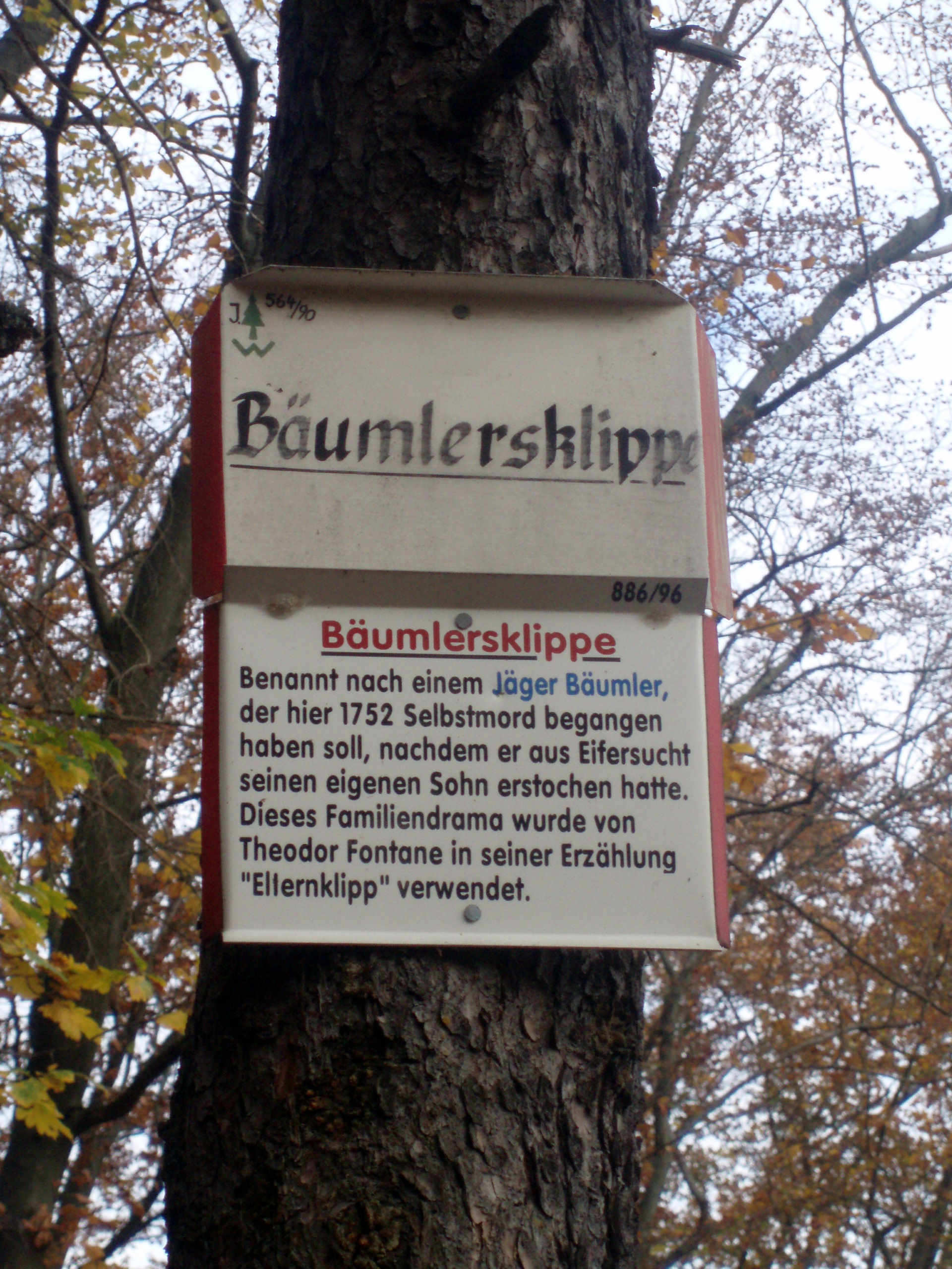 Tafel an der Bäumlersklippe